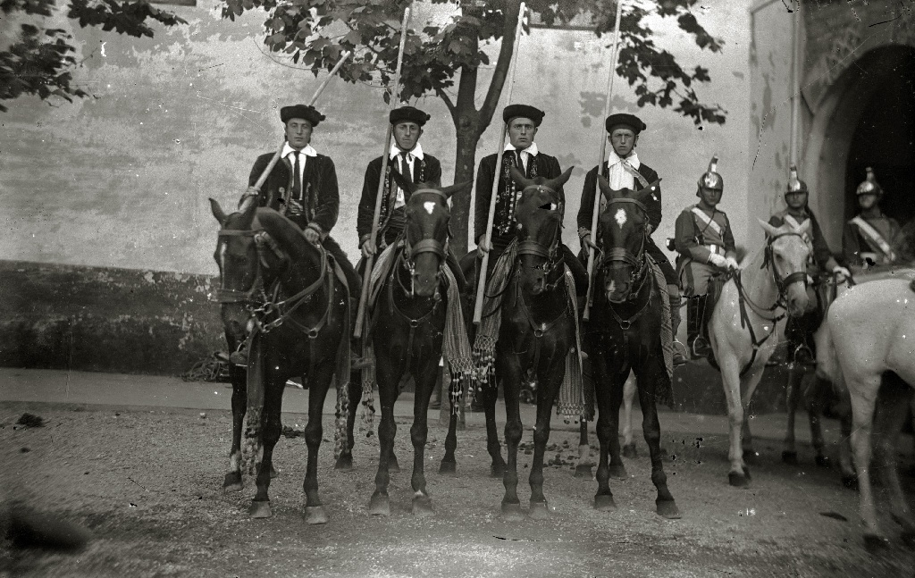 Título original: Corrida goyesca en la plaza de toros de 'El Txofre' (1/17) Localización: San Sebastián (Guipúzcoa)